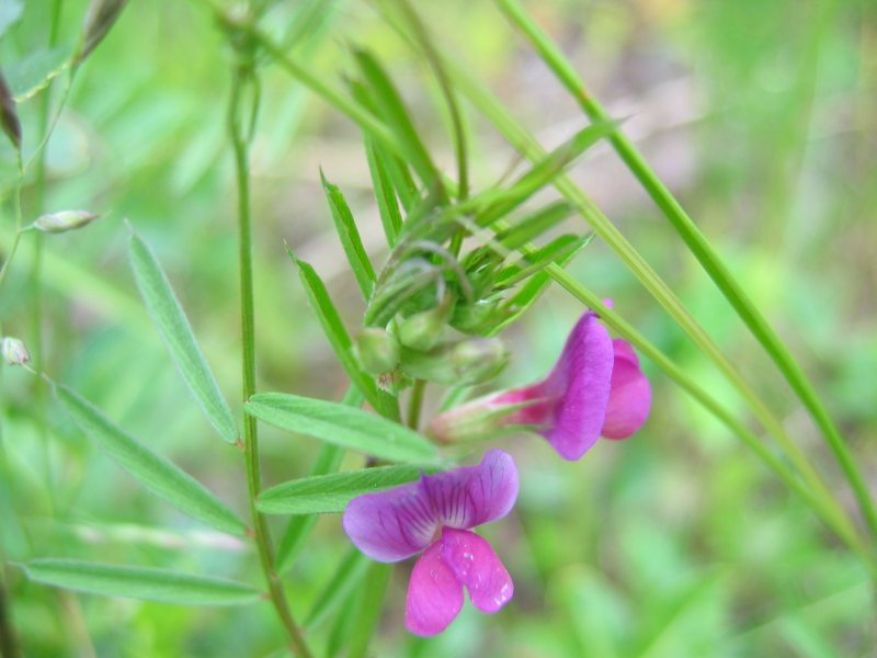 Vicia sativa ssp. nigra